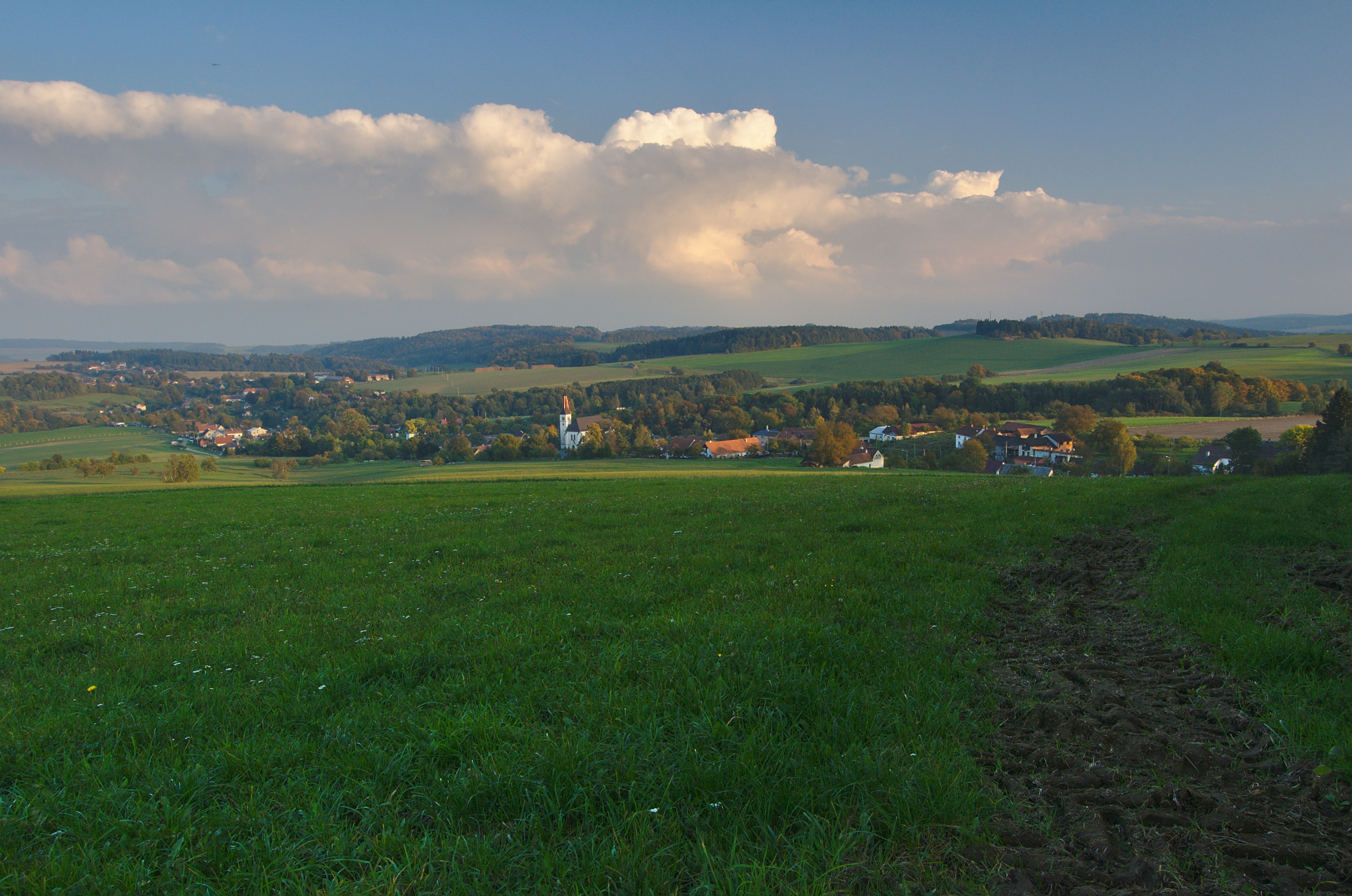 Pohled na obec od vrcholu Zahálkovy skály, Kladky, okres Prostějov